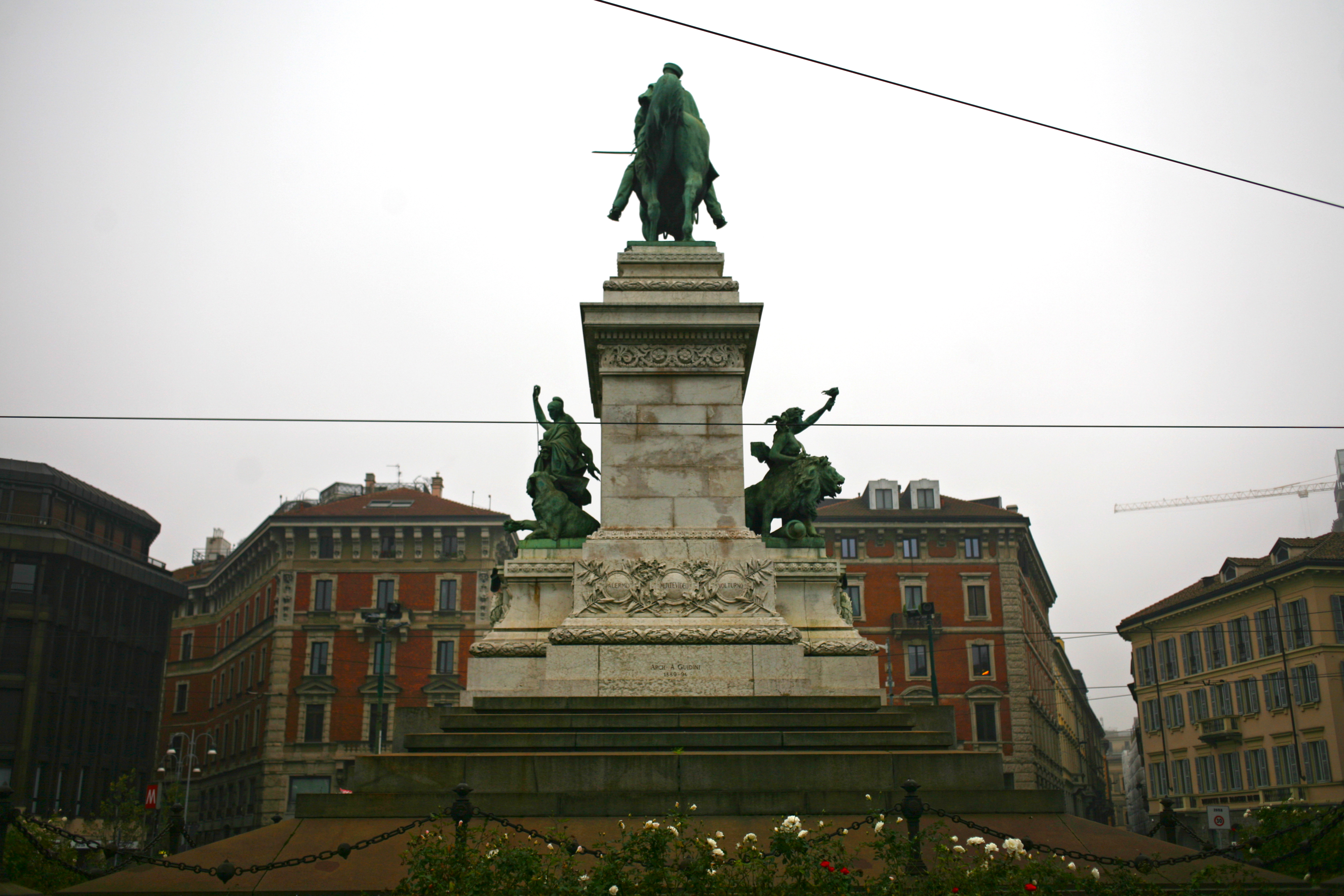 Statua equestre di Giuseppe Garibaldi in Largo Cairoli, vista da dietro verso via Dante (MIlano); scultore Ettore Xiemenes, basamento di Augusto Guidini (1889-1894)